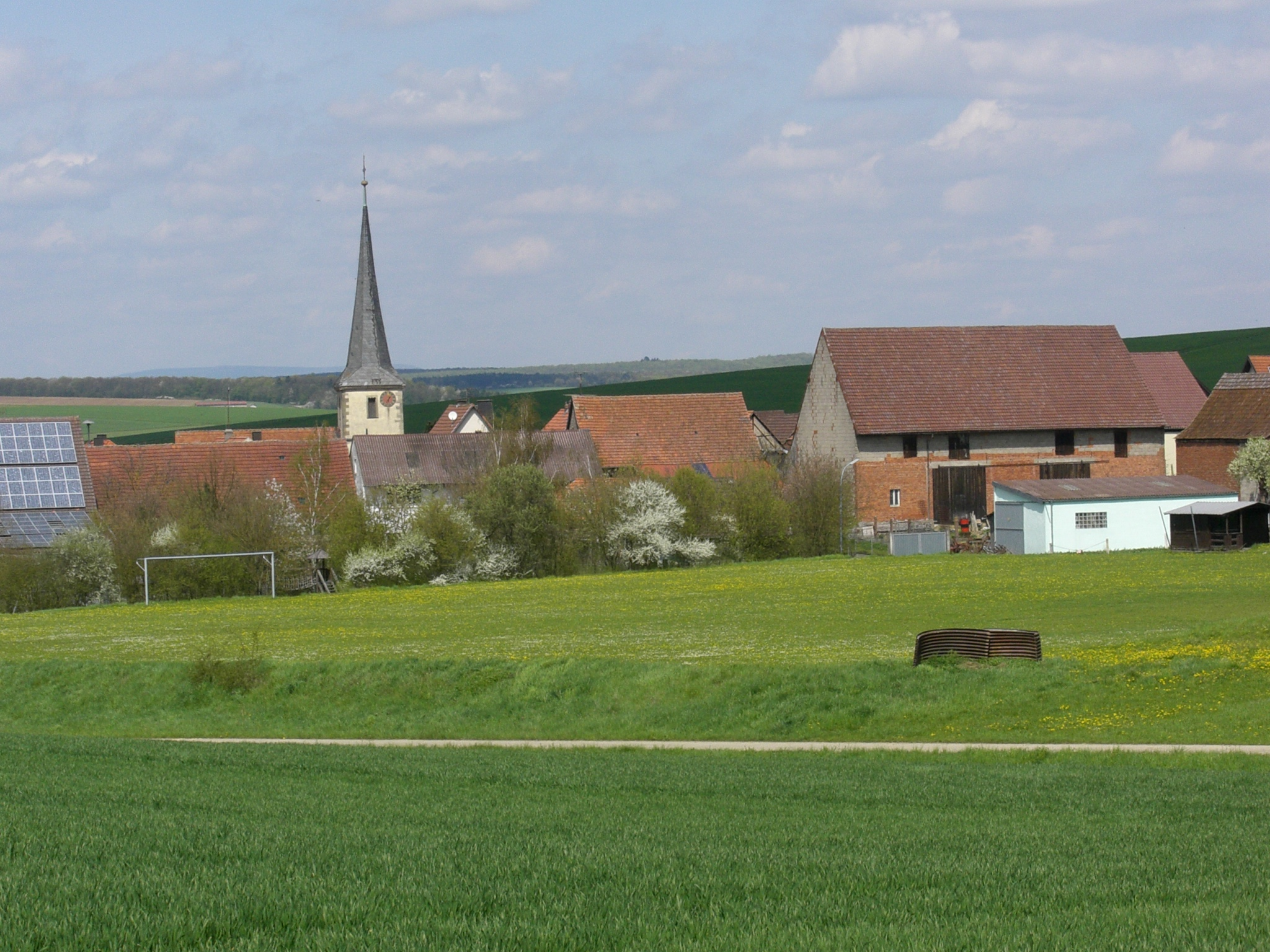 Sportplatz in Rütschenhausen